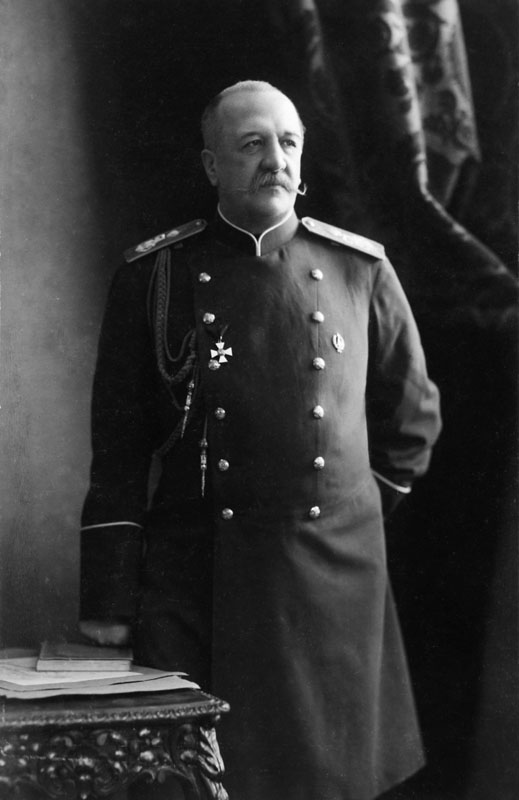 Граф Илларион Иванович Воронцов-Дашков (1837—1916) — русский государственный и военный деятель